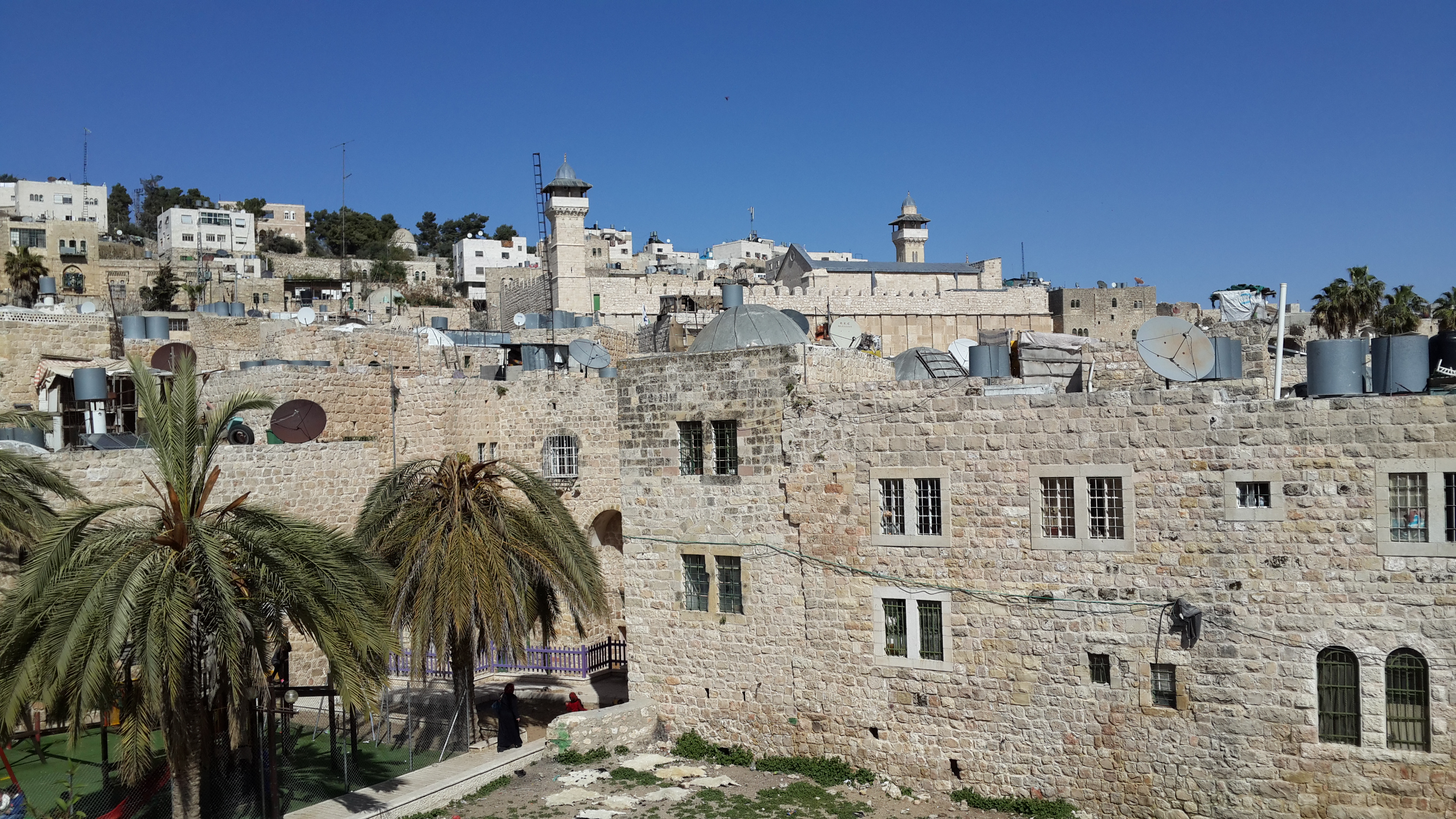 تبين الصورة إطلالة على الحرم الإبراهيمي من أحد أسطح المنازل في البلدة القديمة في خليل الرحمن بفلسطين